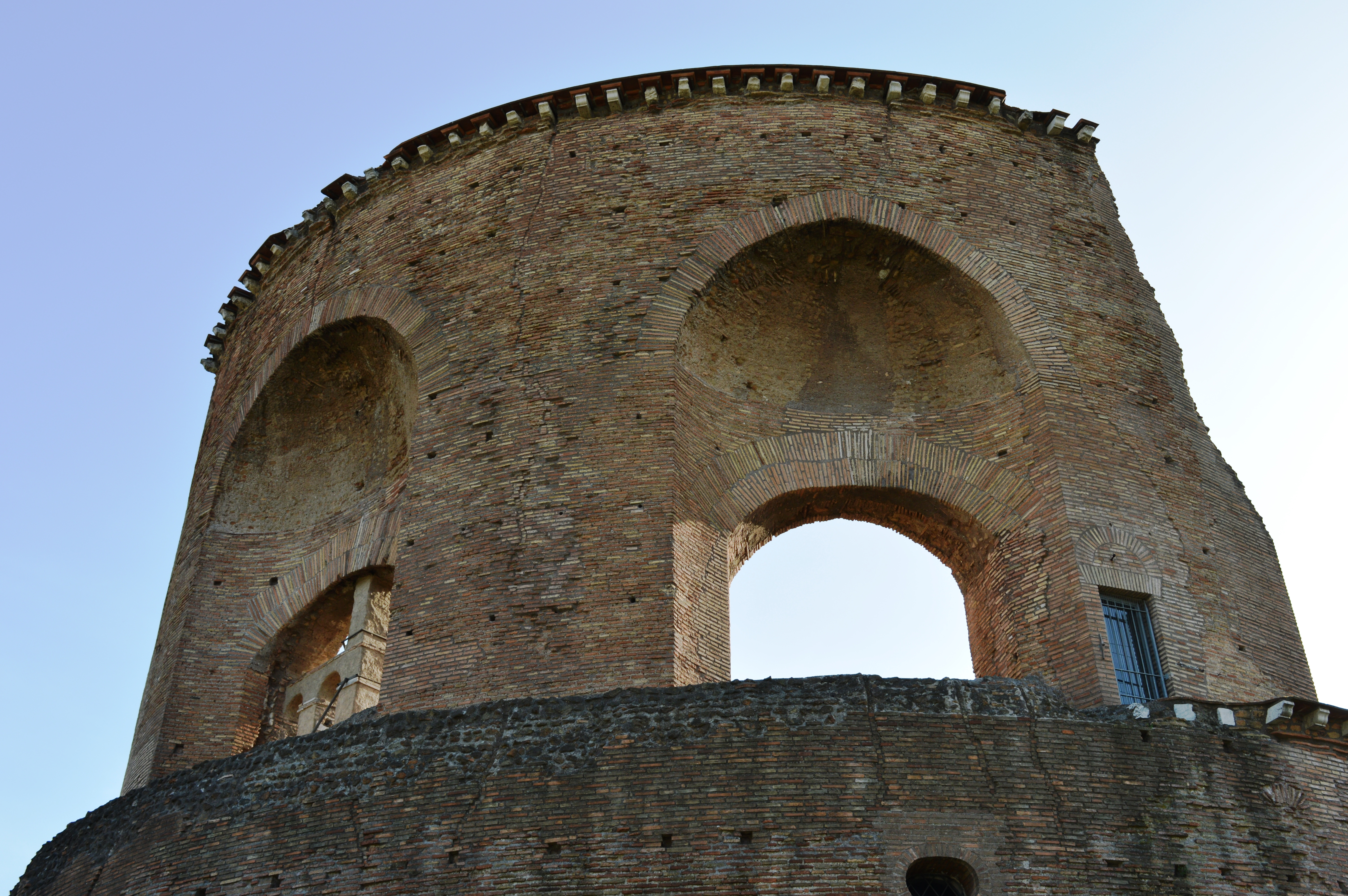 Mausoleo di Sant'Elena This is a photo of a monument which is part of cultural heritage of Italy.